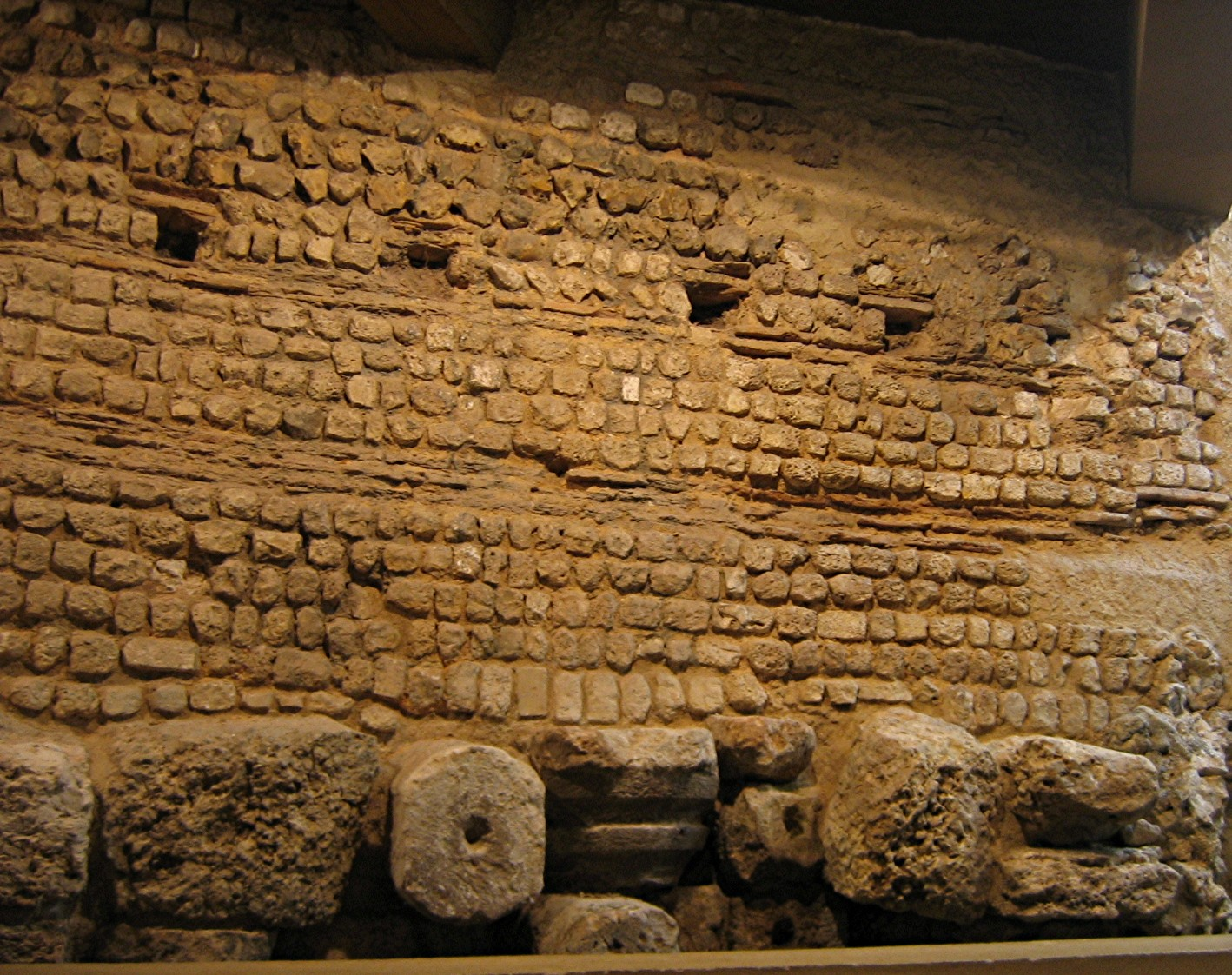 Mur romain (IIIe siècle), avec une chaussée utilisant des remplois (en bas), salle archéologique du musée d'Évreux